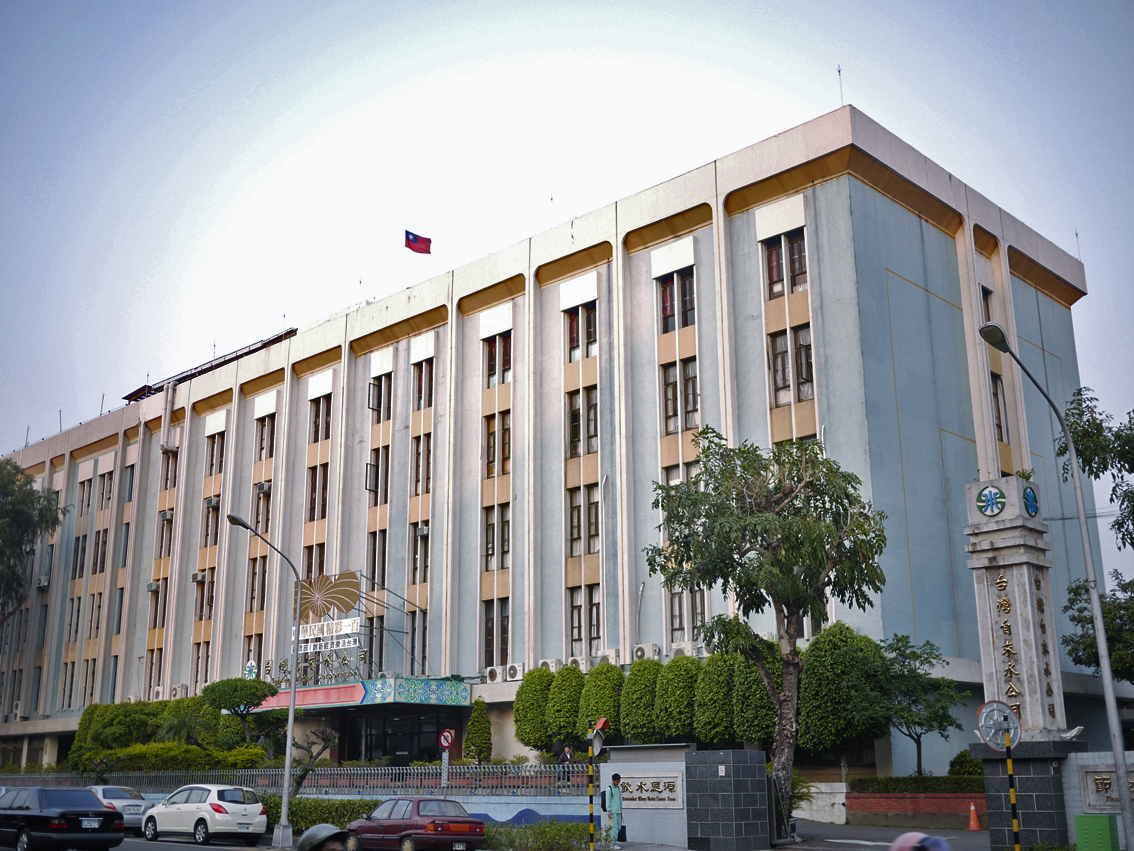 台灣自來水公司總部